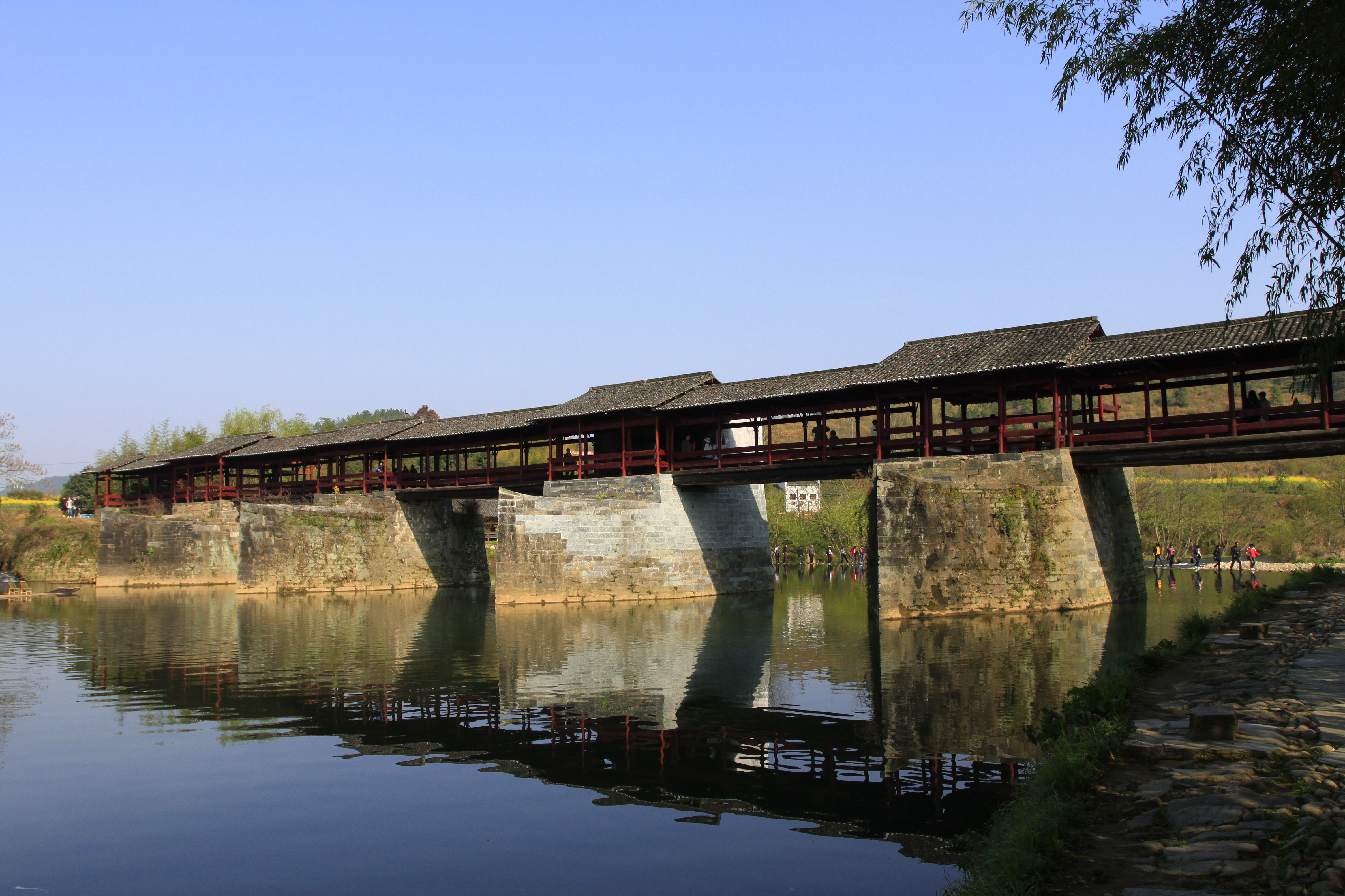 清华彩虹桥，位于中国江西省婺源县清华镇。